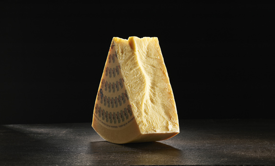 Sbrinz AOC